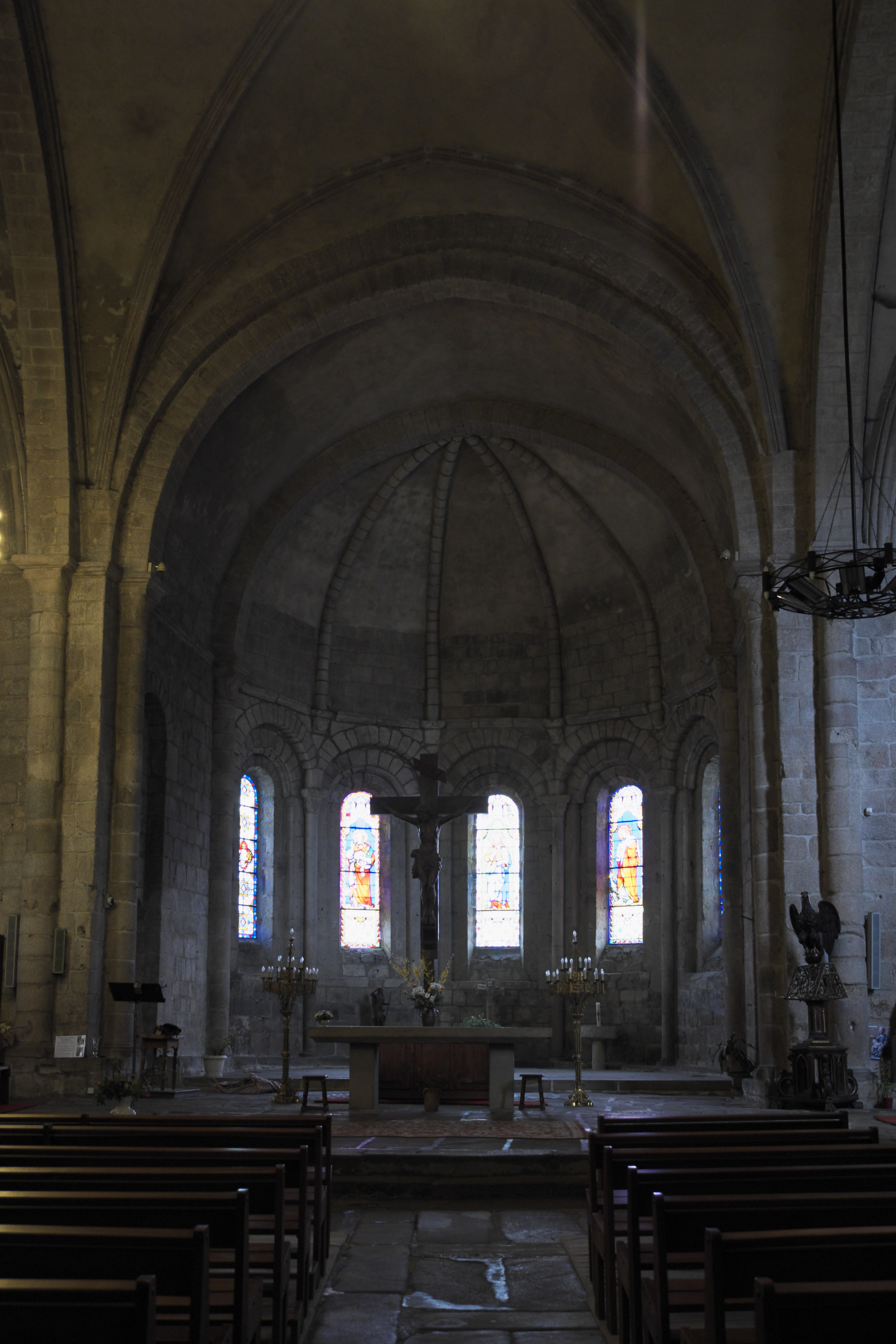 Ehemalige Benediktiner-Abteikirche Saint-André-Saint-Léger in Meymac im Département Corrèze (Nouvelle-Aquitaine/Frankreich), Innenraum